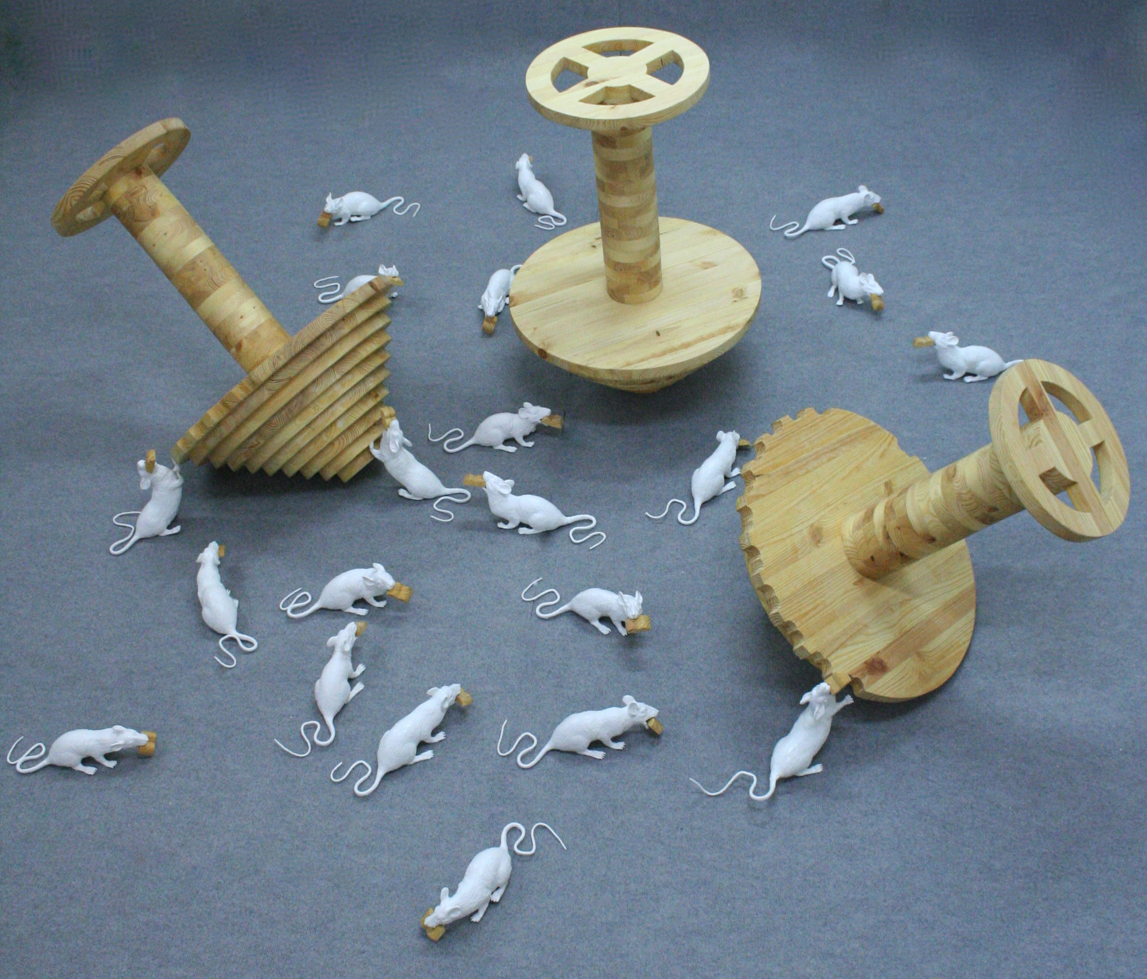 Instal·lació de l'exposició homònima al MAMT(Museu d'Art Modern de Tarragona)